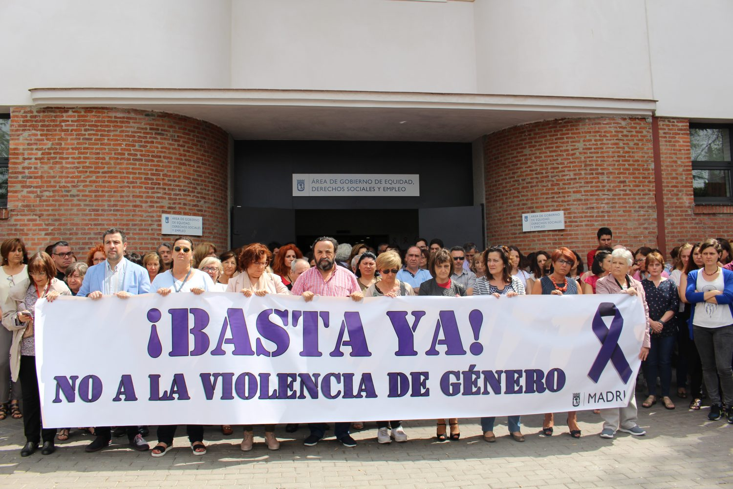 La alcaldesa de Madrid, Manuela Carmena, y la delegada de Políticas de Género y Diversidad, Celia Mayer, junto a otros miembros de la corporación y trabajadores y trabajadoras municipales, ha guardado a mediodía de hoy, lunes 29 de mayo, un minuto de silencio ante el Palacio de Cibeles para lamentar y condenar los últimos asesinatos machistas, ocurridos este fin de semana, en Ciudad Lineal y Collado Villalba.